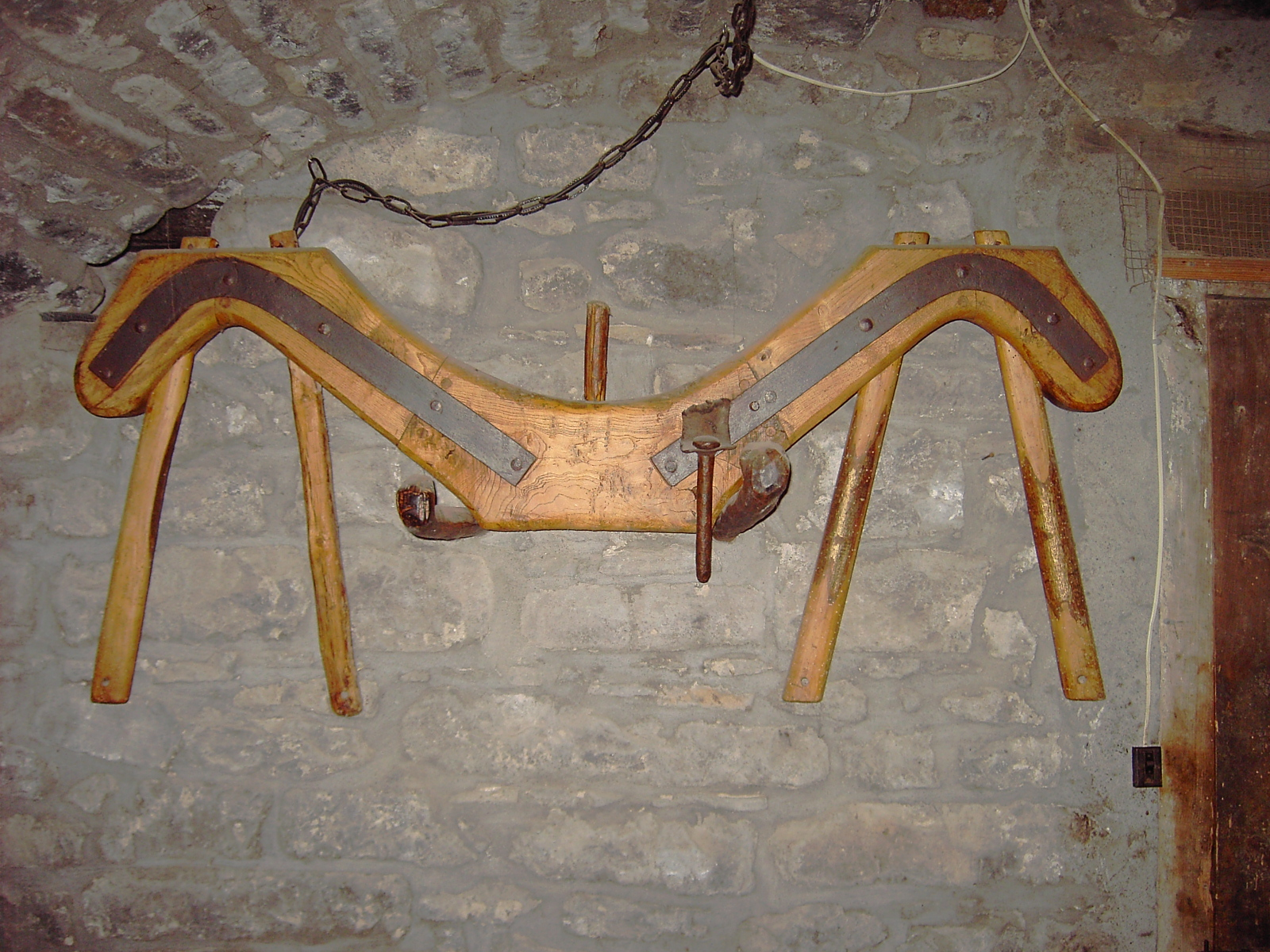 Yugo o Ixubo tradicional, en Sobrarbe, Huesca, España. La forma arqueada de ambas colleras permite deducir que era un modelo empleado para tiros equinos.